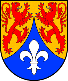 Escudo del apellido Salamanca procedente de Burgos, condes de Fuente el Salce en 1689.